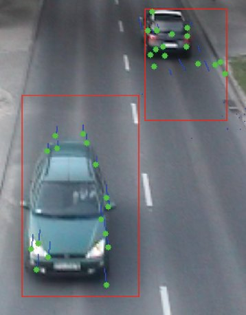 System rozpoznający obiekty wykrył samochód na zdjęciu